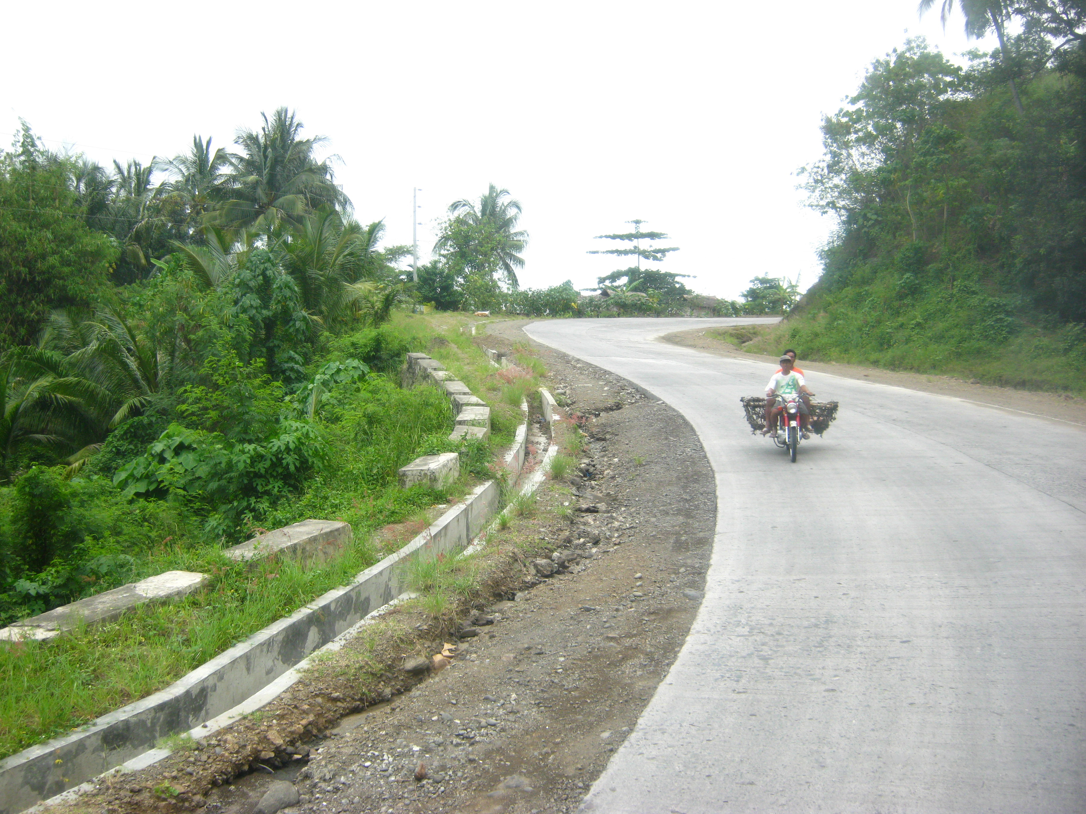 Makar - Digos Highway